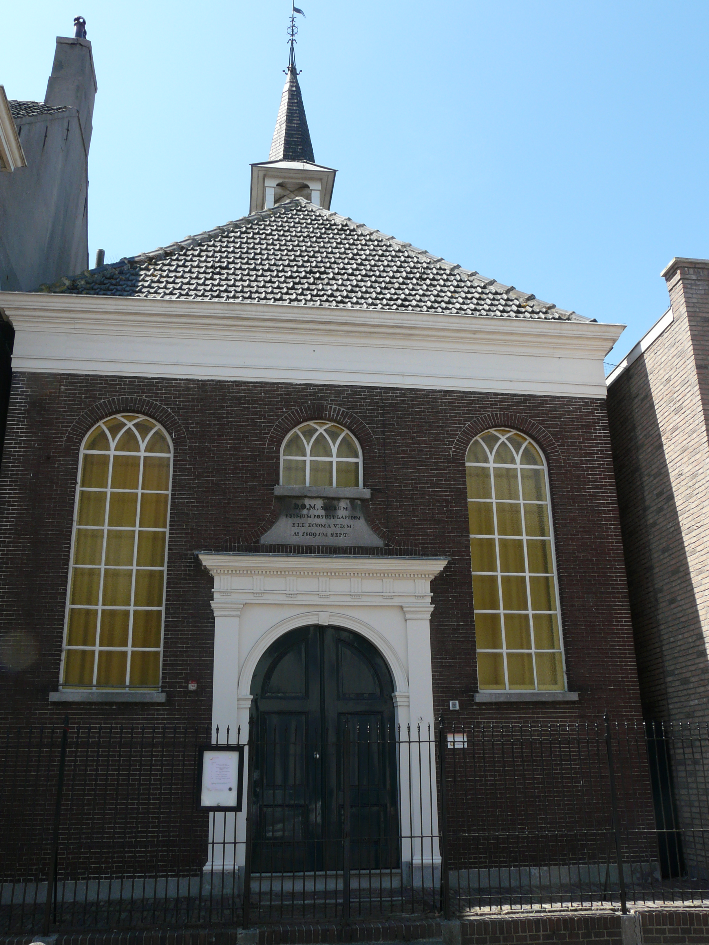 Hervormde kerk in de Dorpsstraat in Oud Gastel